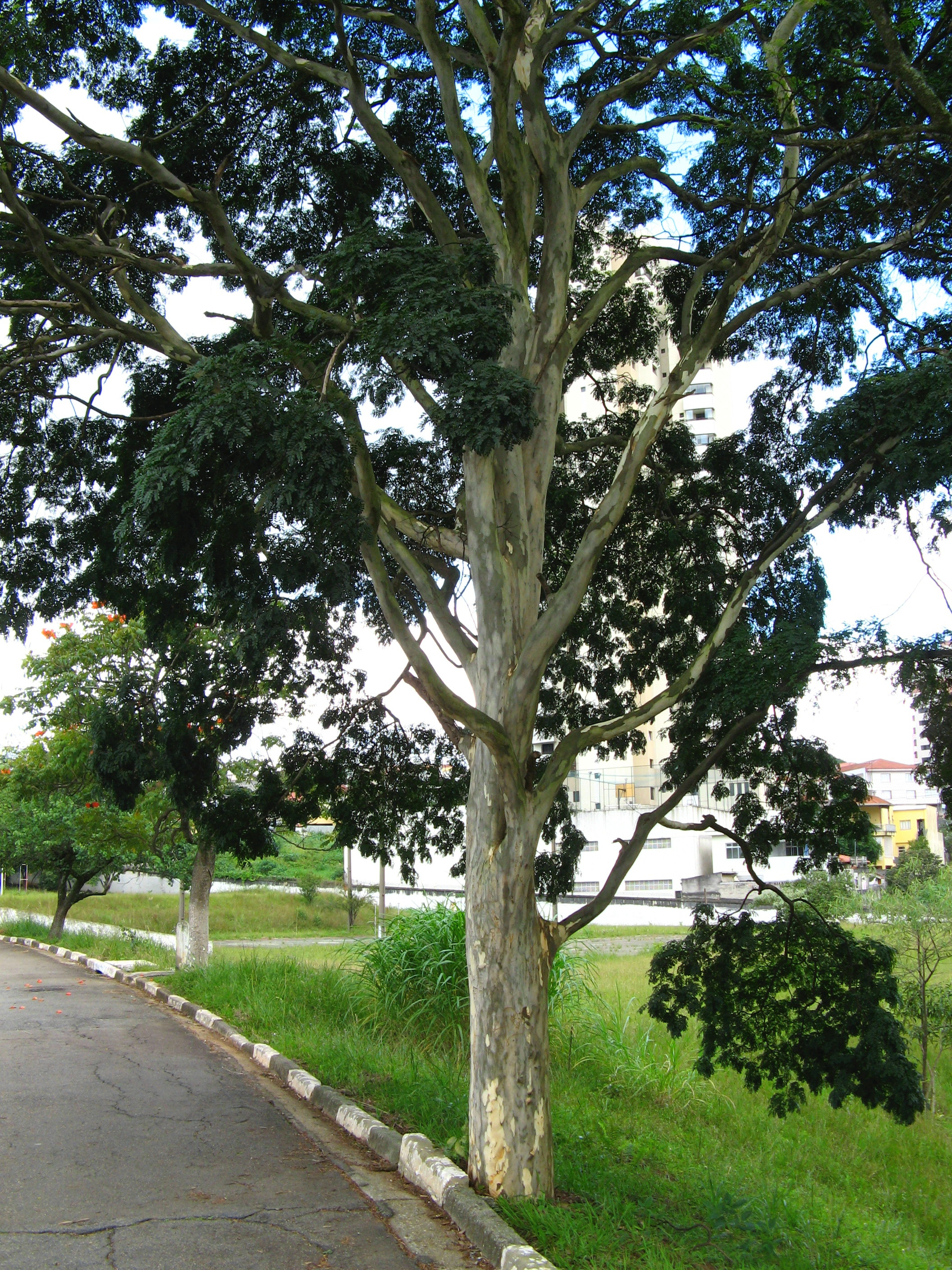 pau ferro